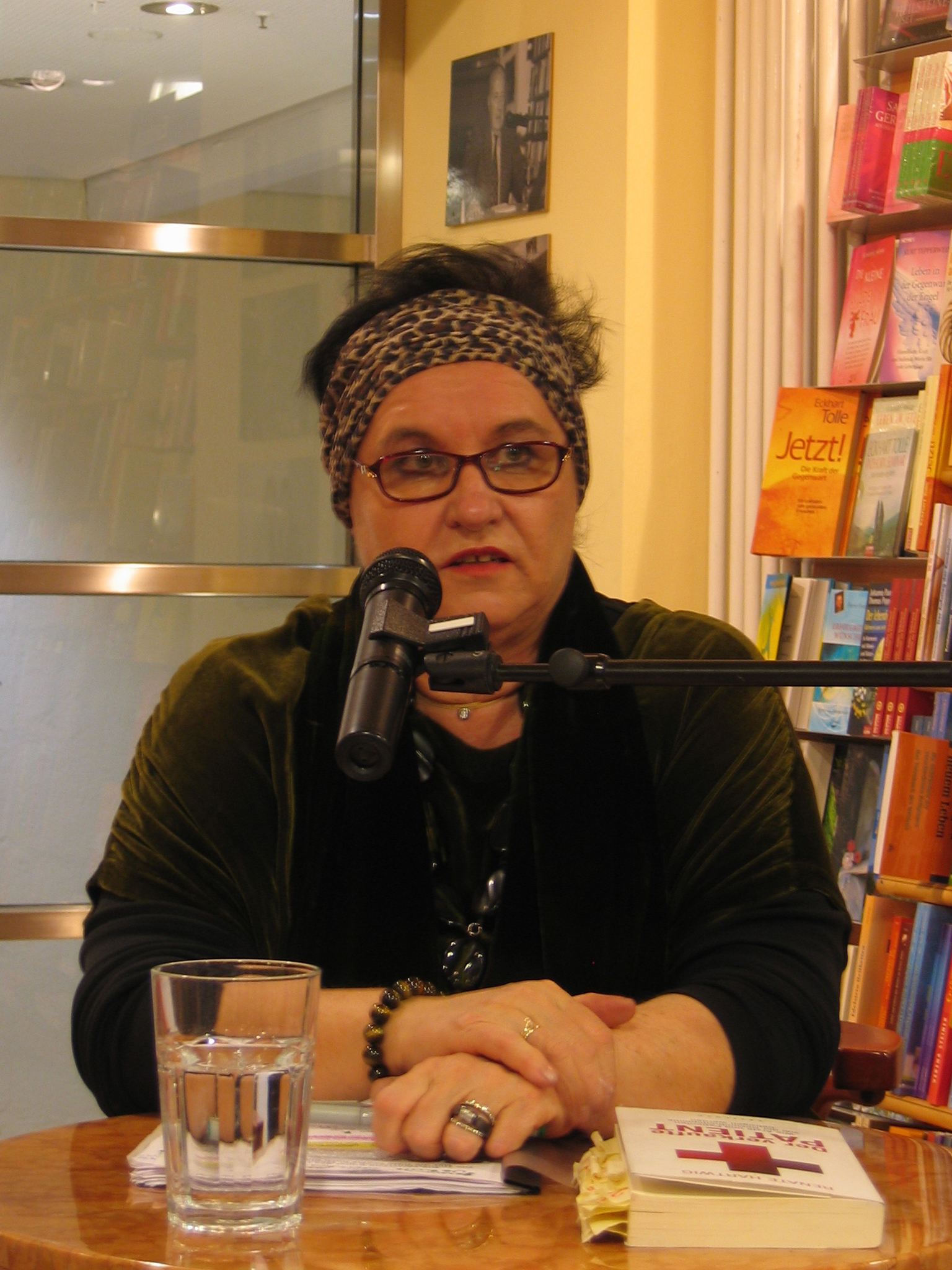 Die Autorin Renate Hartwig präsentiert ihr Buch in Köln